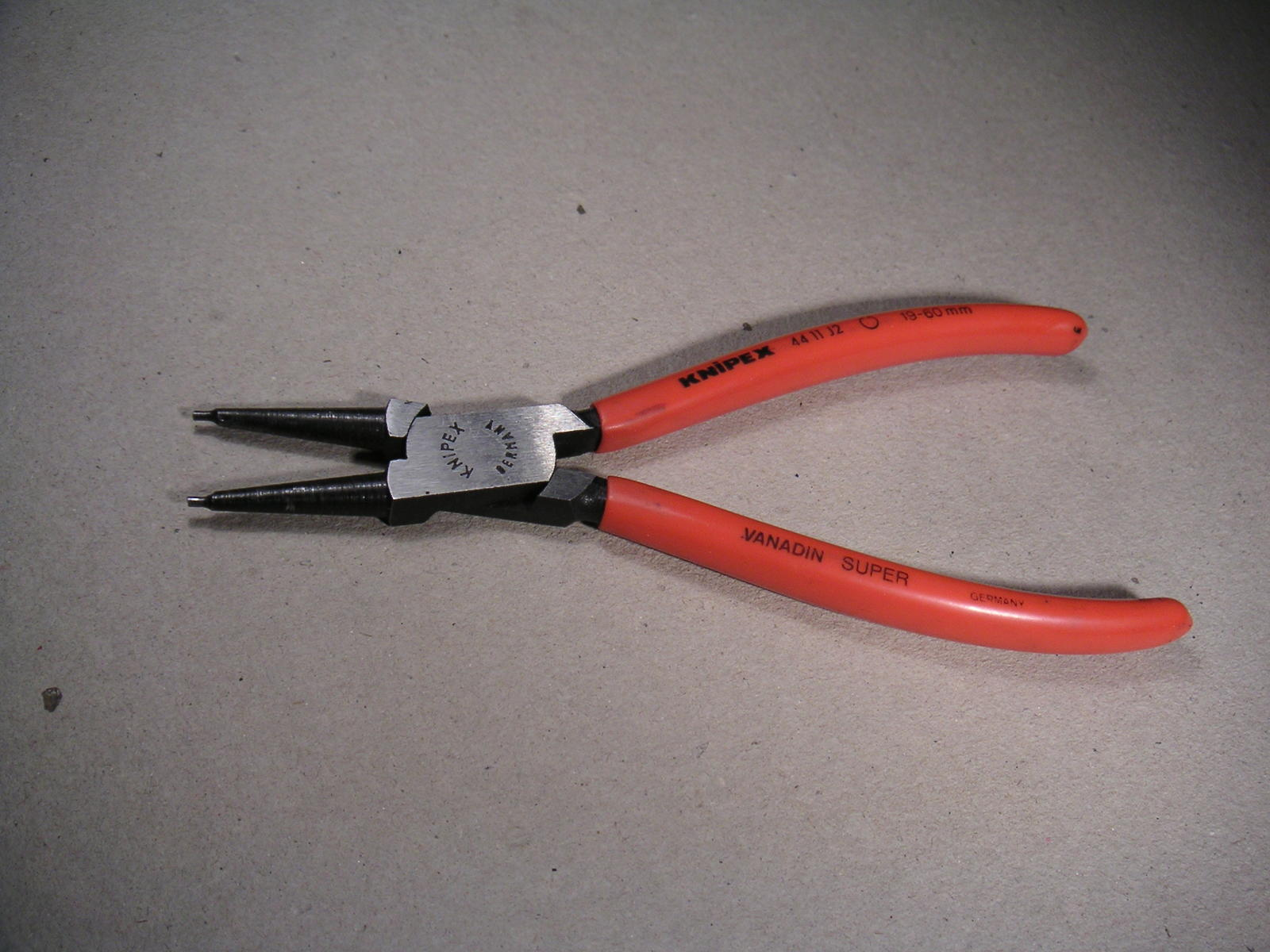 Sicherungsringzange Fabrikat Knipex